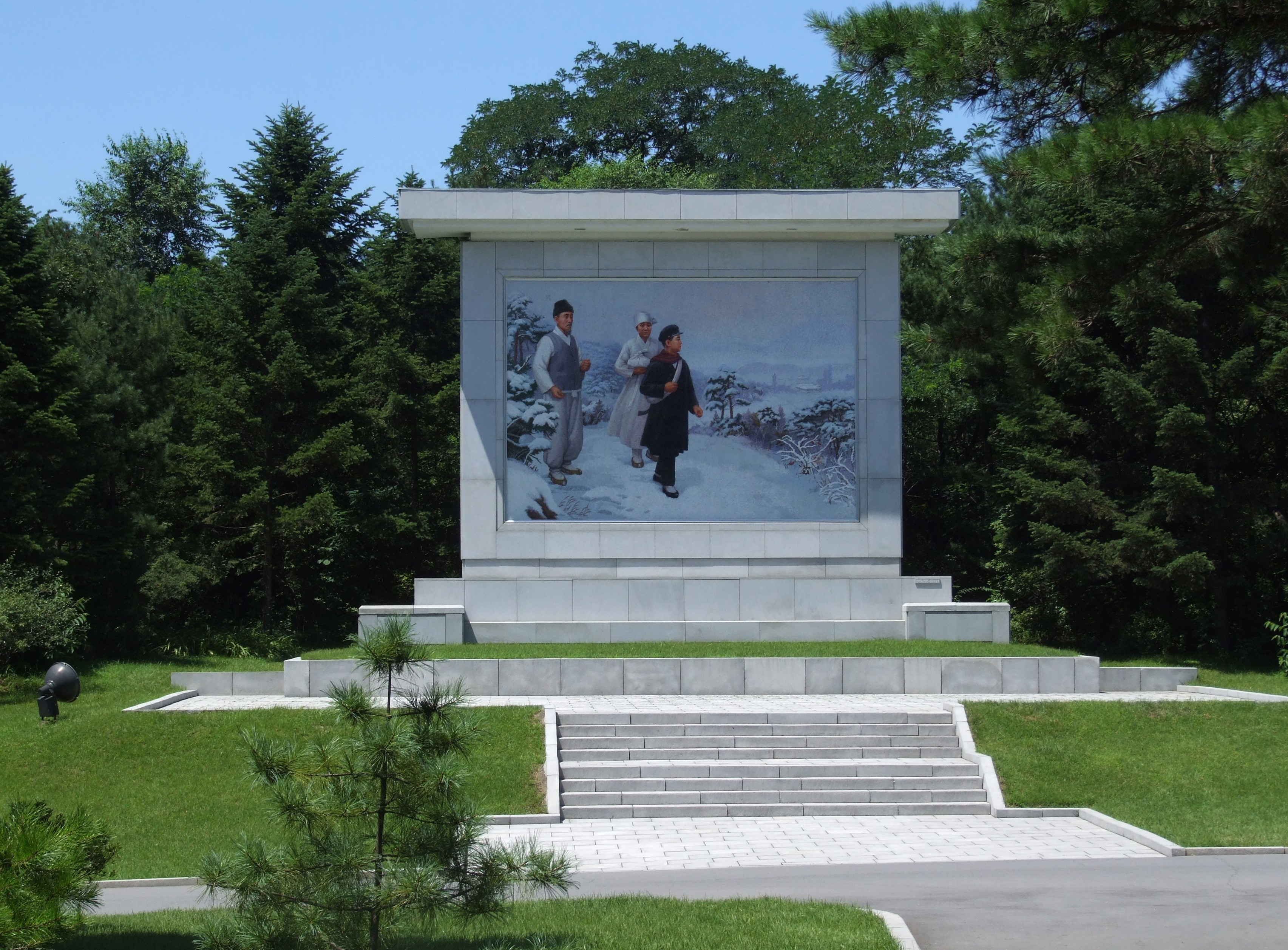 Gemälde Am Geburtsort von Kim Il-sung